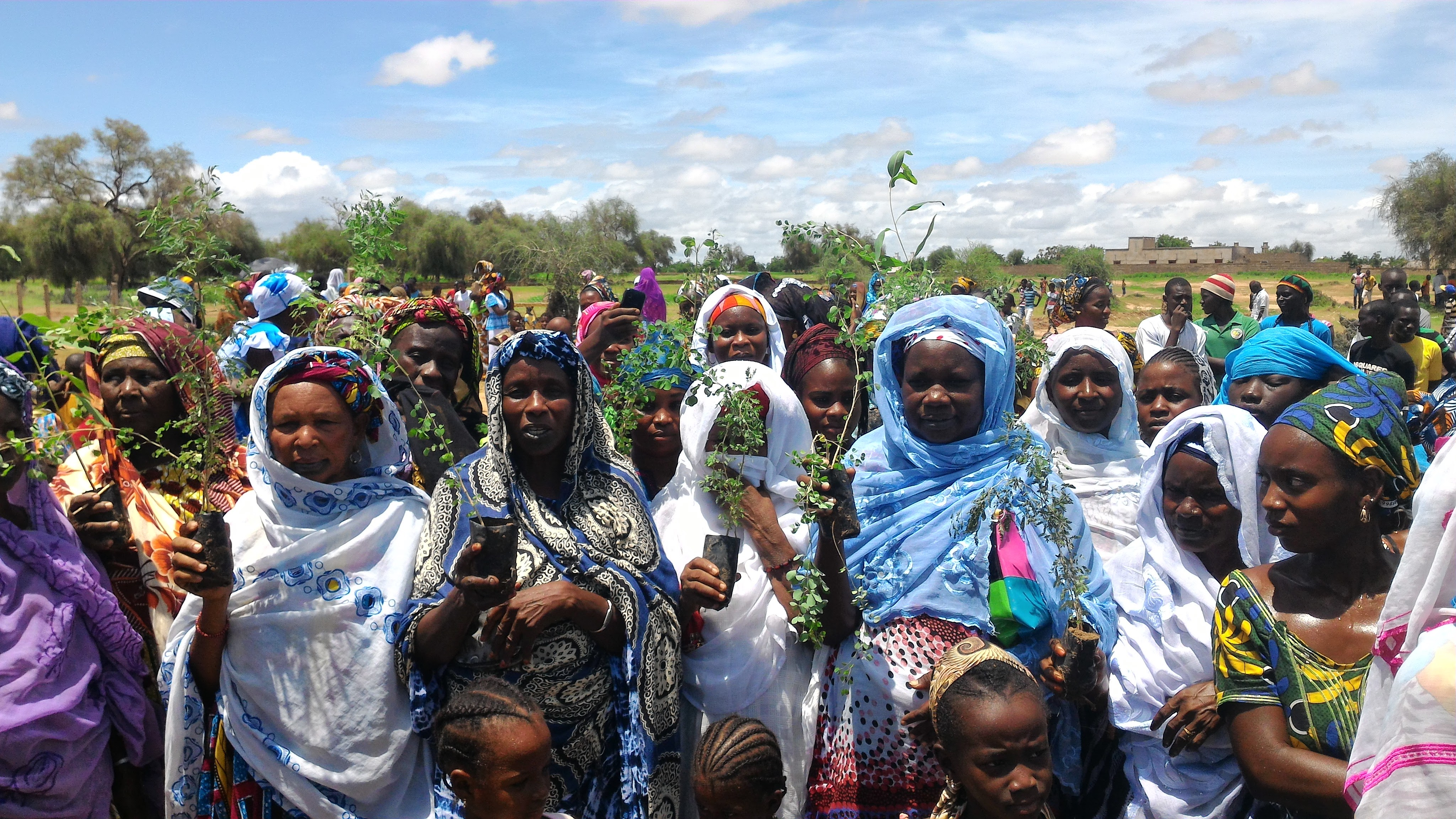 Toutes les femmes du village de Polel dioubé debout pour le reboisement dans l'unité de POLEL ; le village est situé au nord-est du Sénégal, situé dans le département de Kanel (région de Matam), à une quinzaine de kilomètres du fleuve Sénégal et de la frontière avec la Mauritanie.